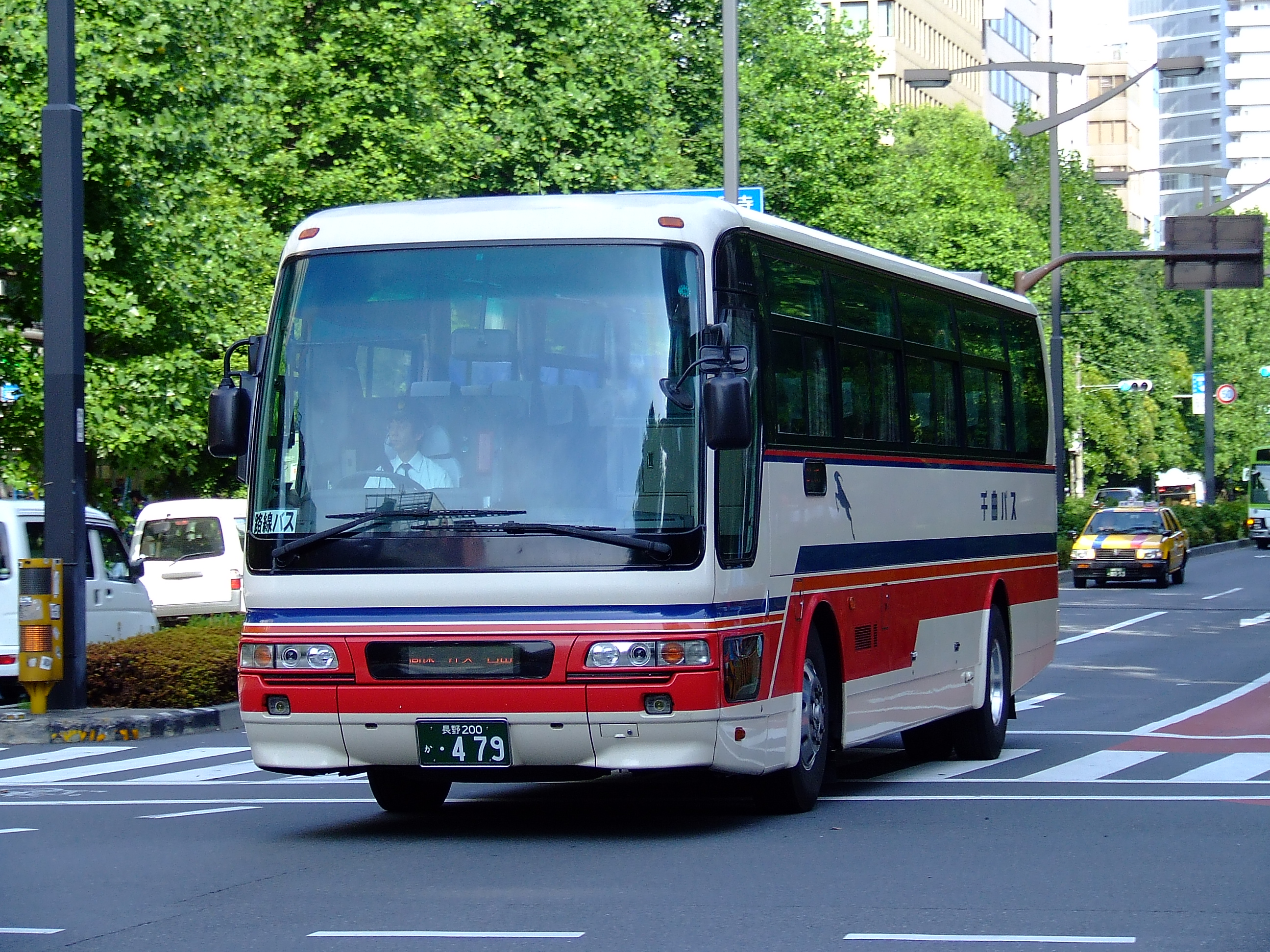 千曲バスの高速バス（千曲三線 写真は佐久・臼田行き）